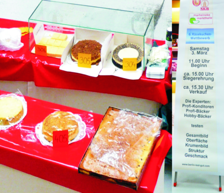 Berlin-Kreuzberg, 6. Berlin-Brandenburger Käsekuchenwettbewerb